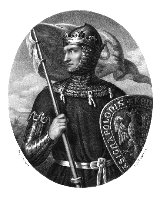 Przemysł II King of Poland